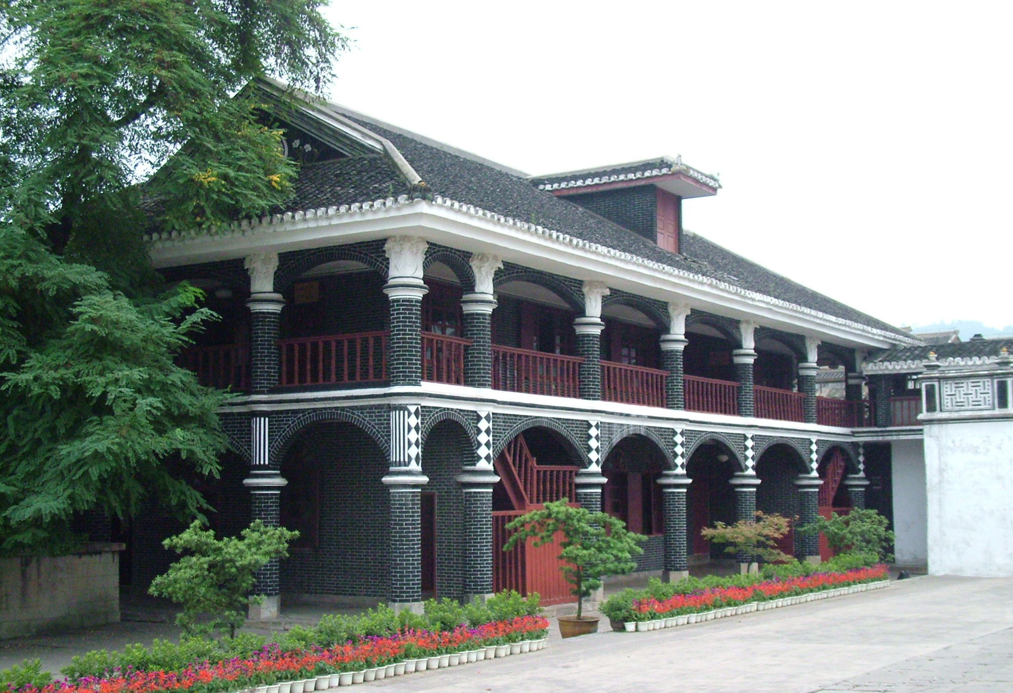 作者在GNU下重新上传。